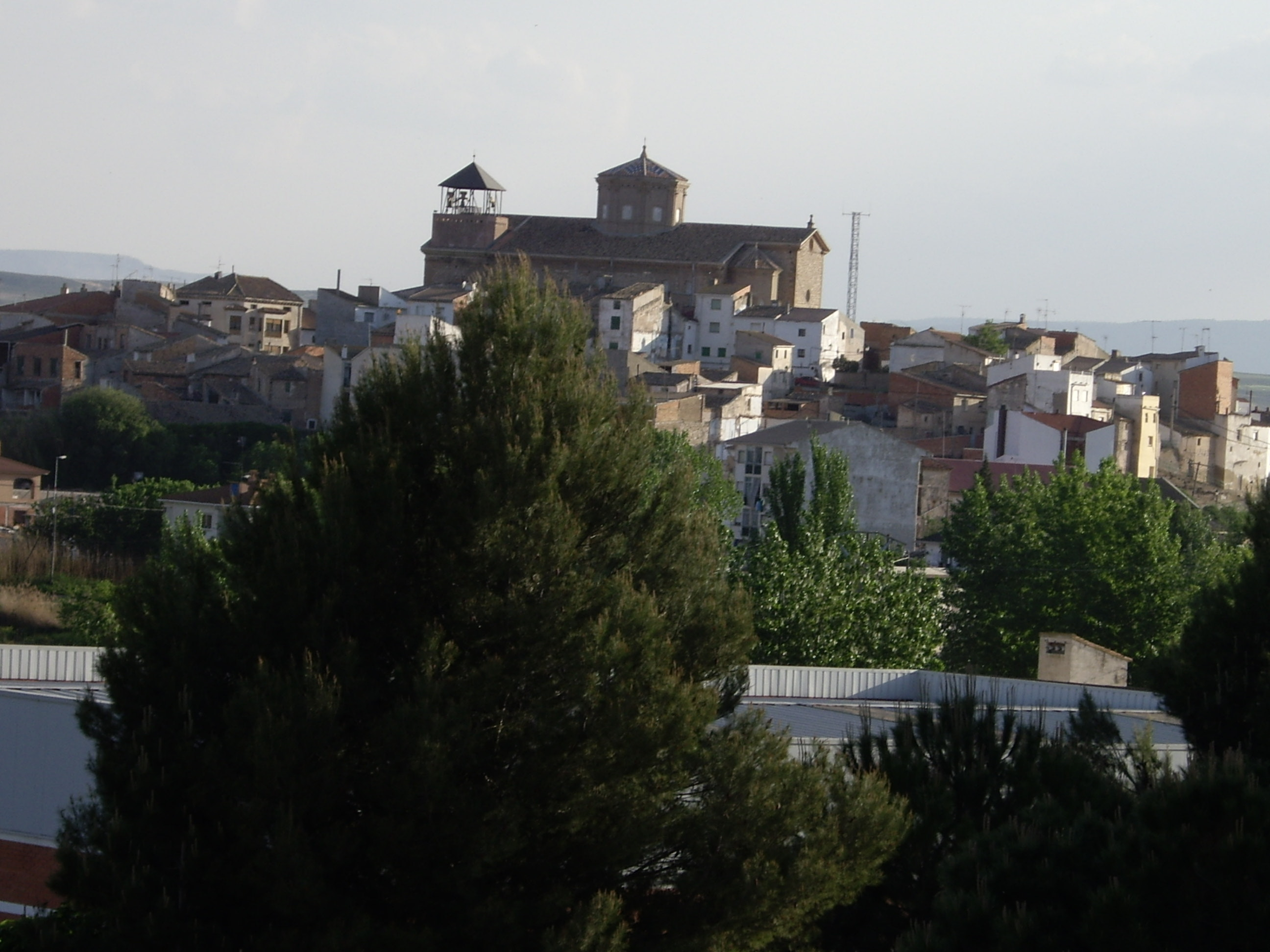 vue du Village de La puebla de Hijar (espagne), avril 2006